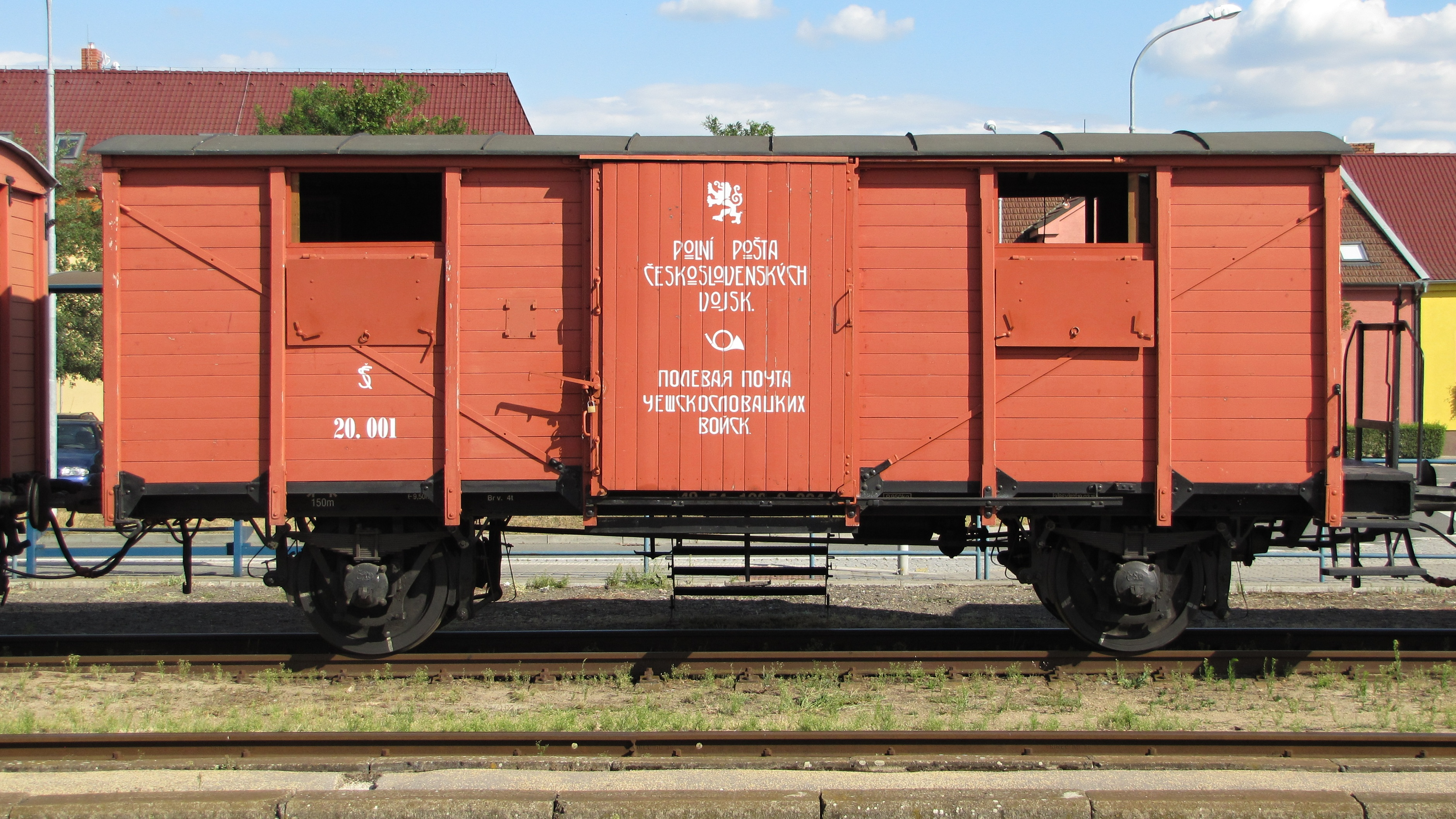 Putovní muzeum Legiovlak na železniční stanici Kyjov – vůz polní pošty